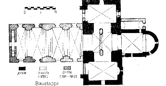 Planul bisericii din Turnişor, Sibiu.